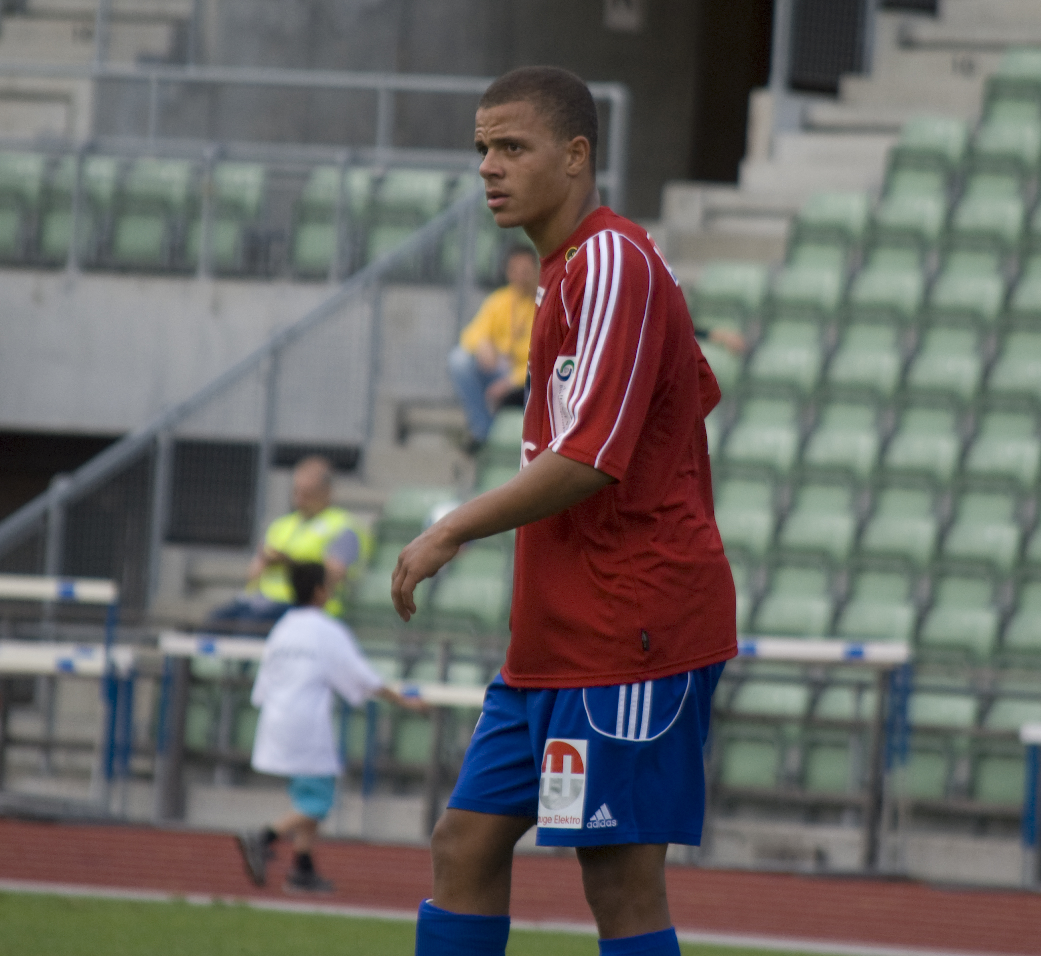 Skeid vs. Tromsdalen (TUIL) 2-0 (2-0) at Bislett stadion 12 July 2009.